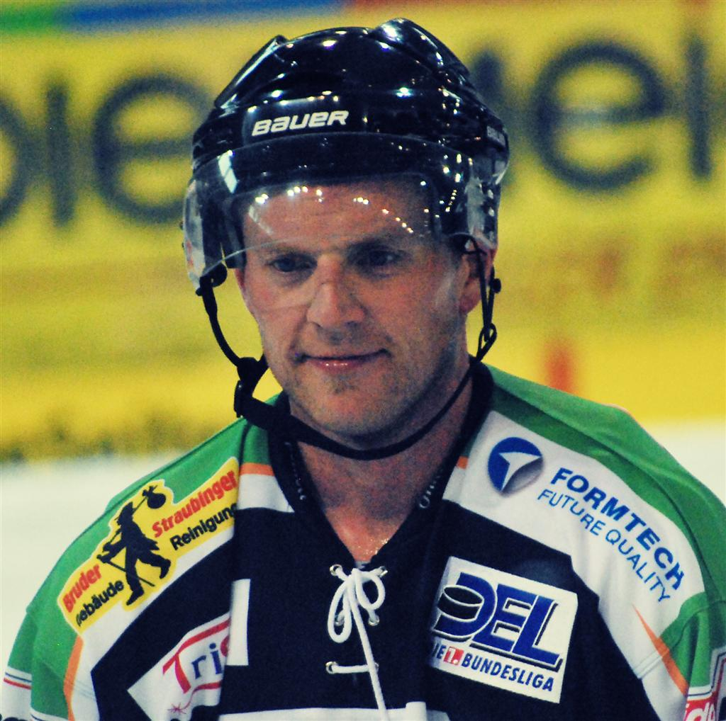 Derek Hahn